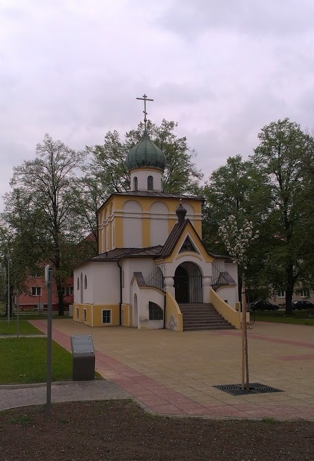 Pravoslavný kostel svatých Cyrila a Metoděje, Slovanské náměstí, parc. 2627, Kroměříž.